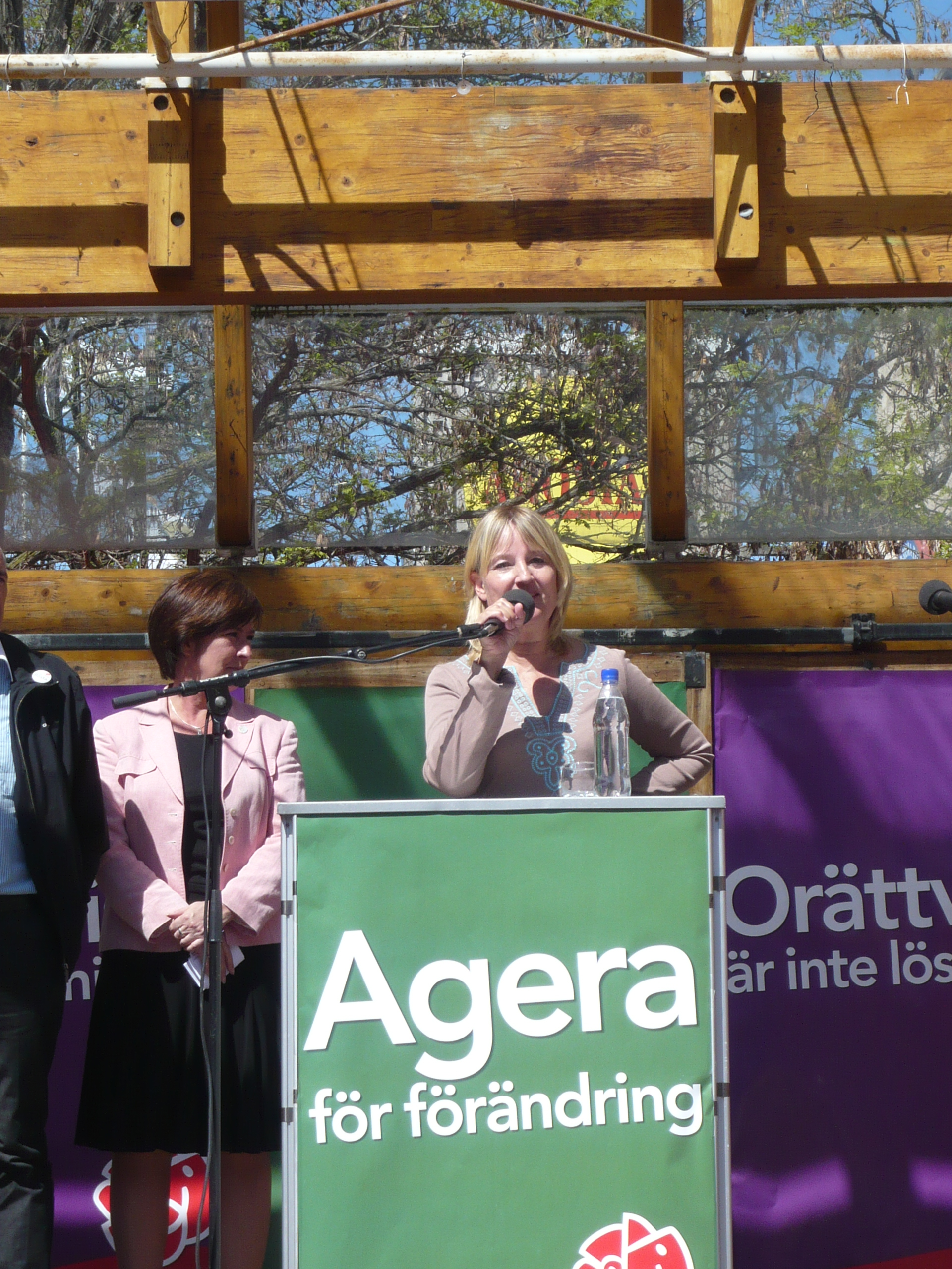 Marita Ulvskog i Västerås inför EU-valet